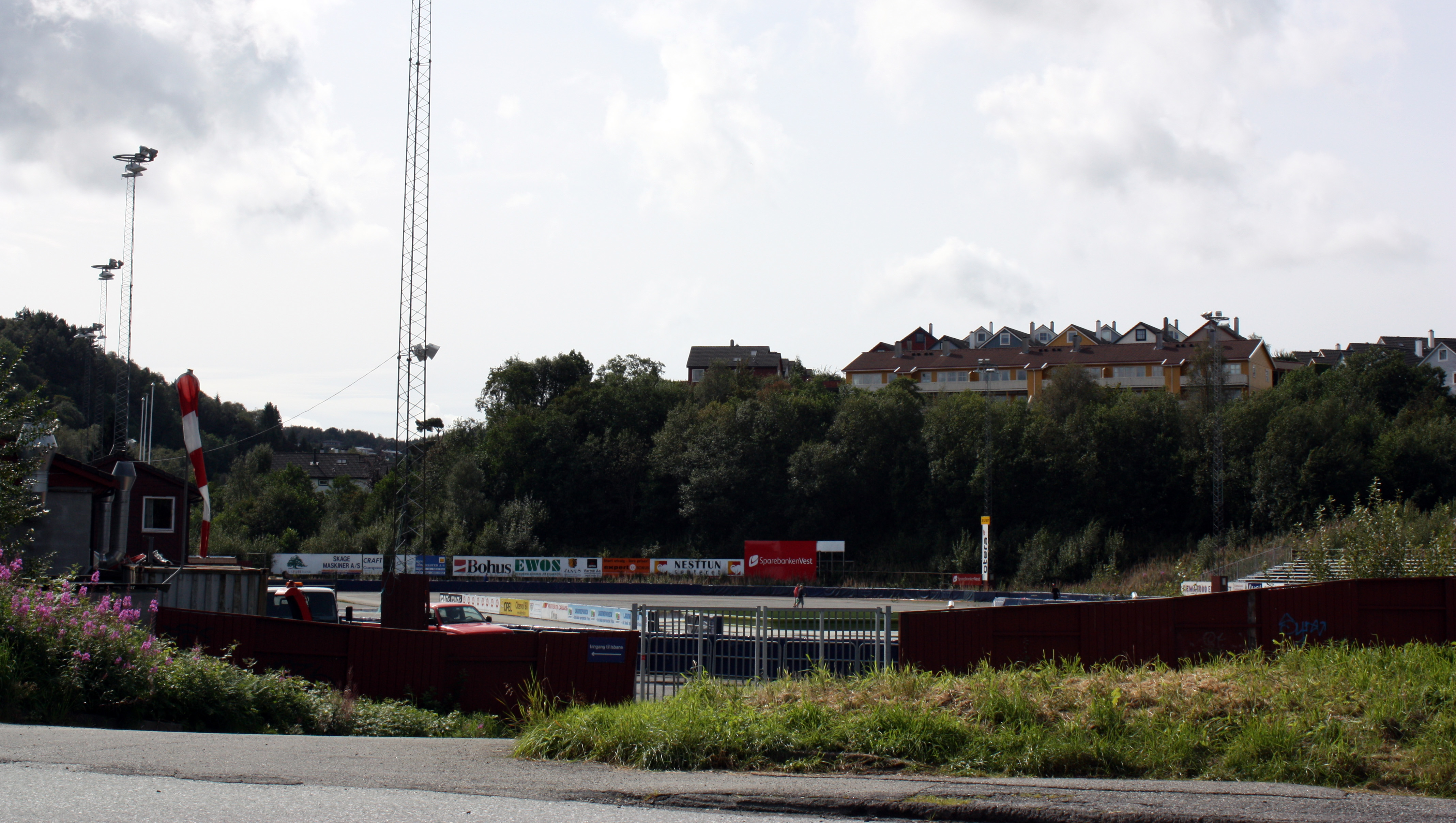 Slåtthaug knustisbane, Fana, Bergen. August 2009.